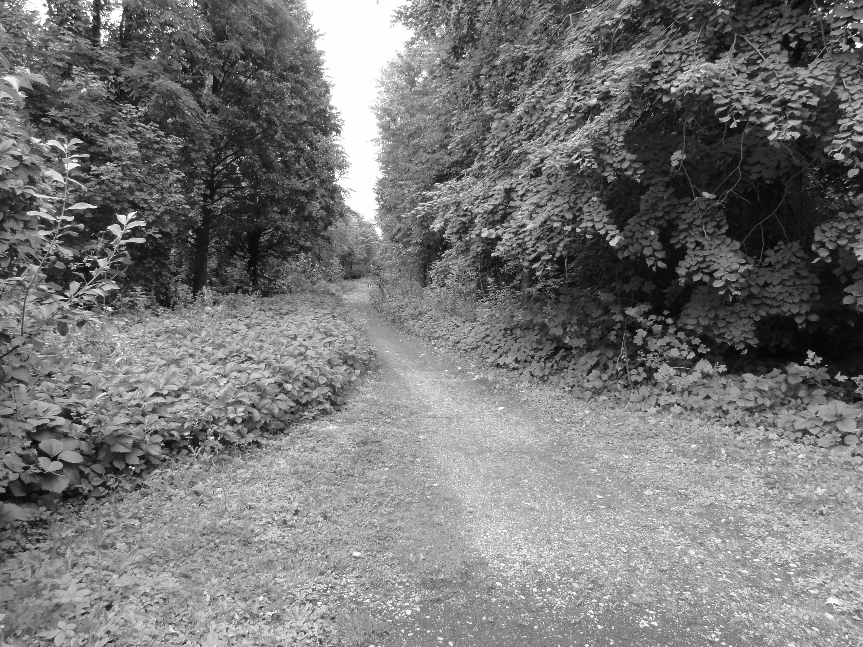 Terril n° 70B dit Acacias, fosse n° 3 - 4 de la Compagnie des mines de Meurchin, Wingles, Pas-de-Calais, Nord-Pas-de-Calais, France.